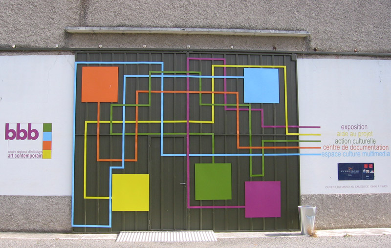 Le bbb centre régional d'initiatives pour l'art contemporain